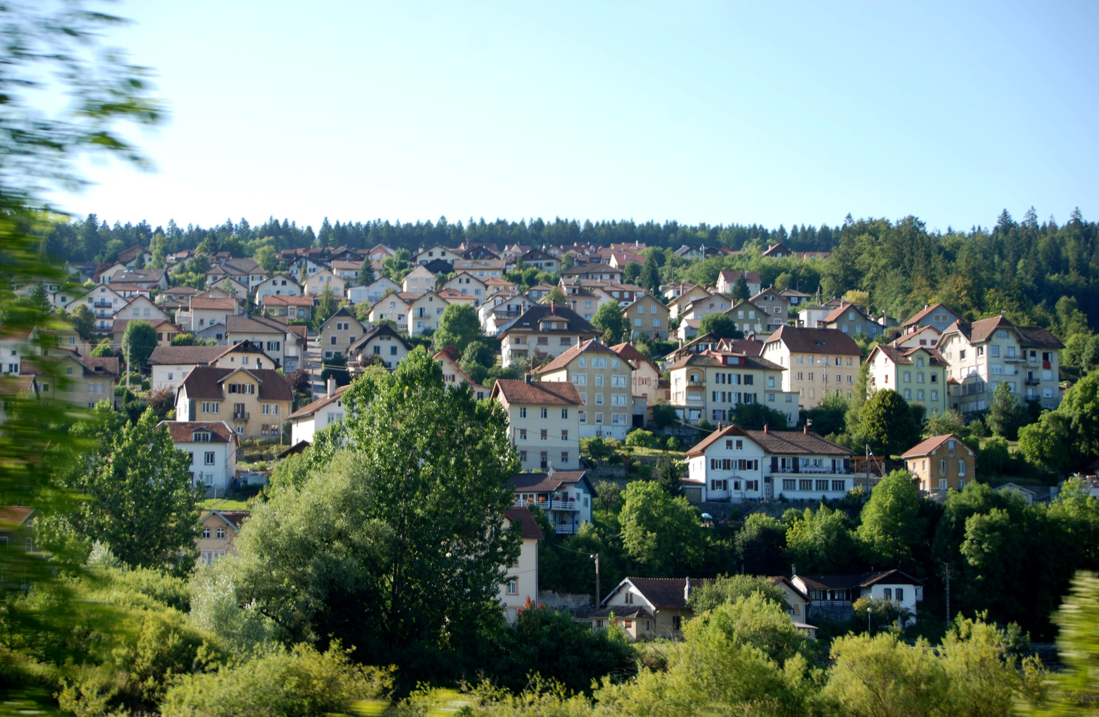 Villers le Lac